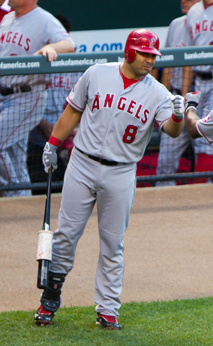 Kendrys Morales